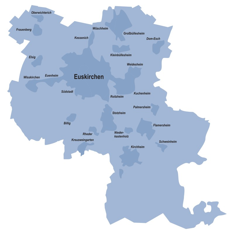 Stadtteile von Euskirchen